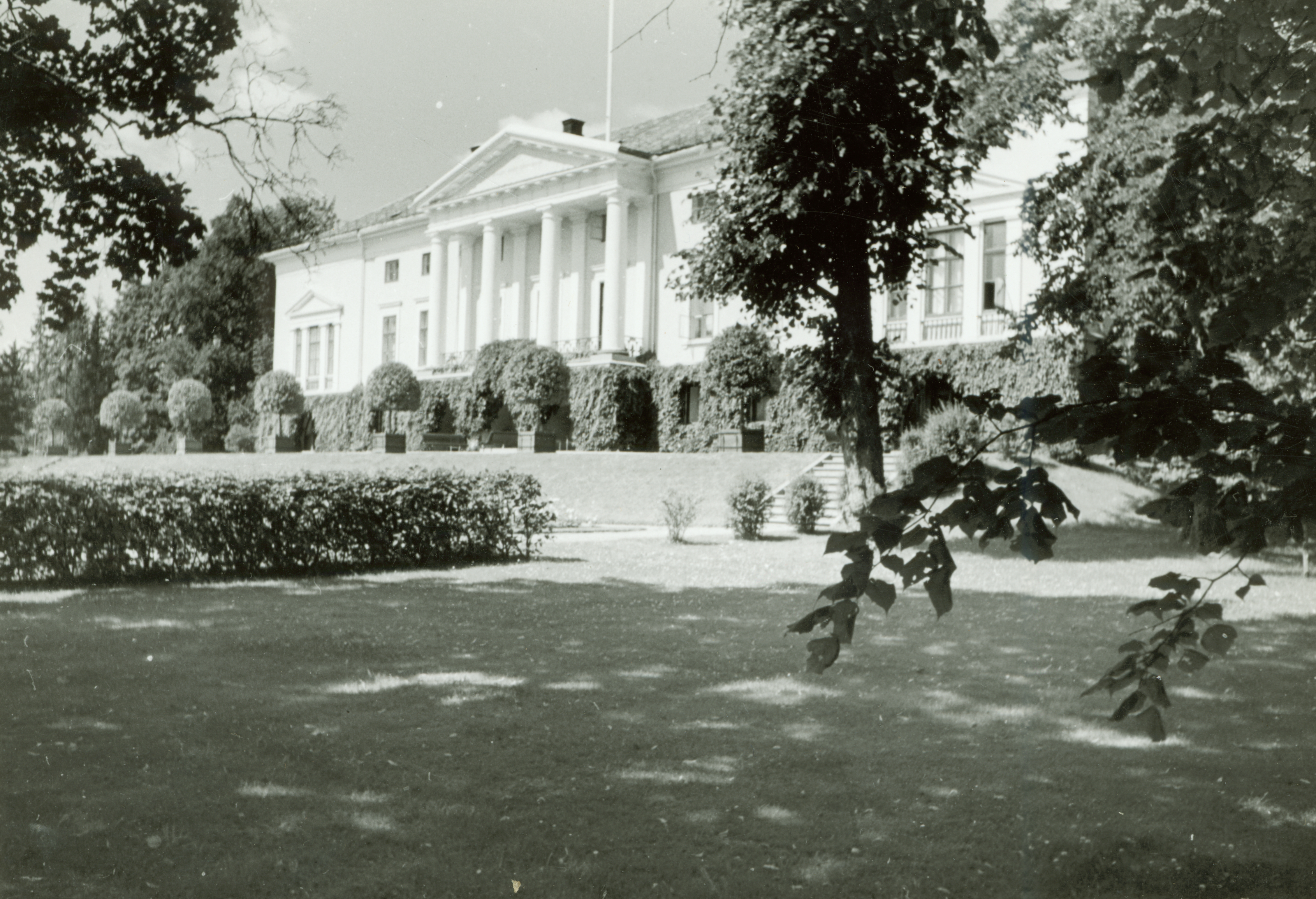 Fossum Nordre i Gjerpen, Telemark Byggeår 1811. Arkitekter var Christian Frederik Hansen og Johan Gottfried Böydler. Fredet i 1924. Hagefasade. This image on crowdsourcing geotagging platform Fotodugnad